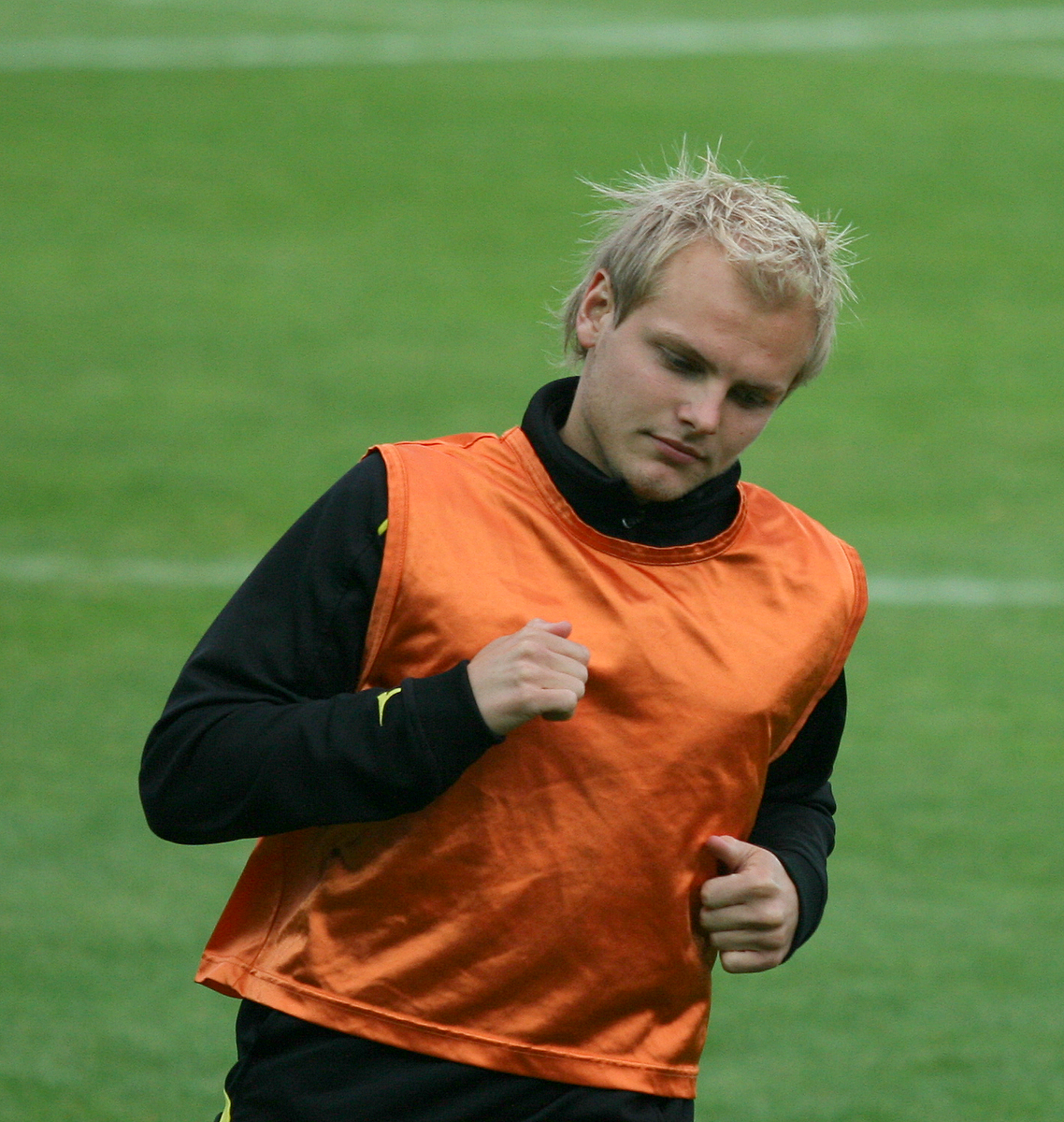 Magnus Myklebust